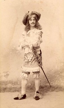 Náday Béla (1877 – 1937 ) magyar színész.